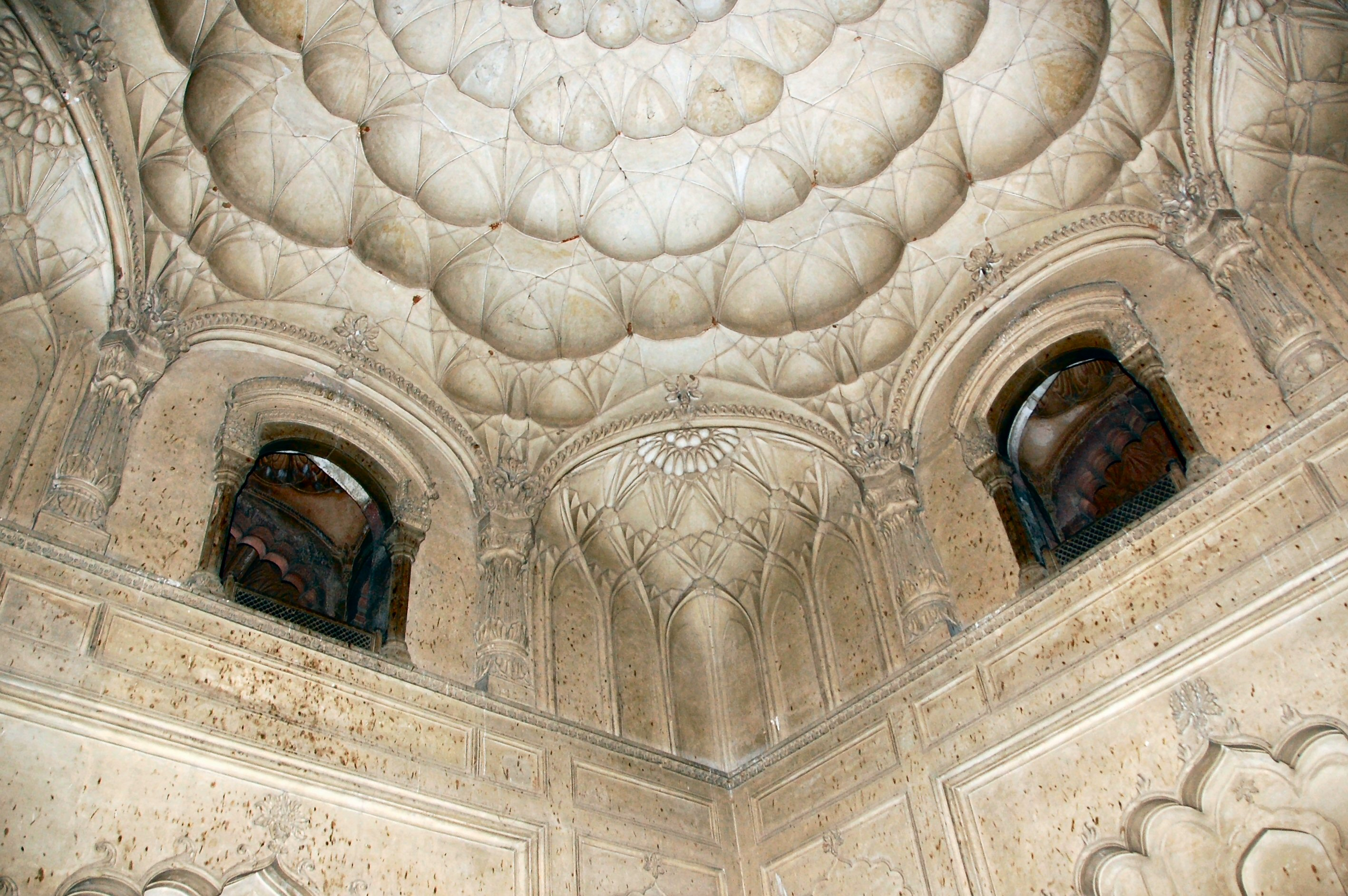 Safdarjung's Tomb